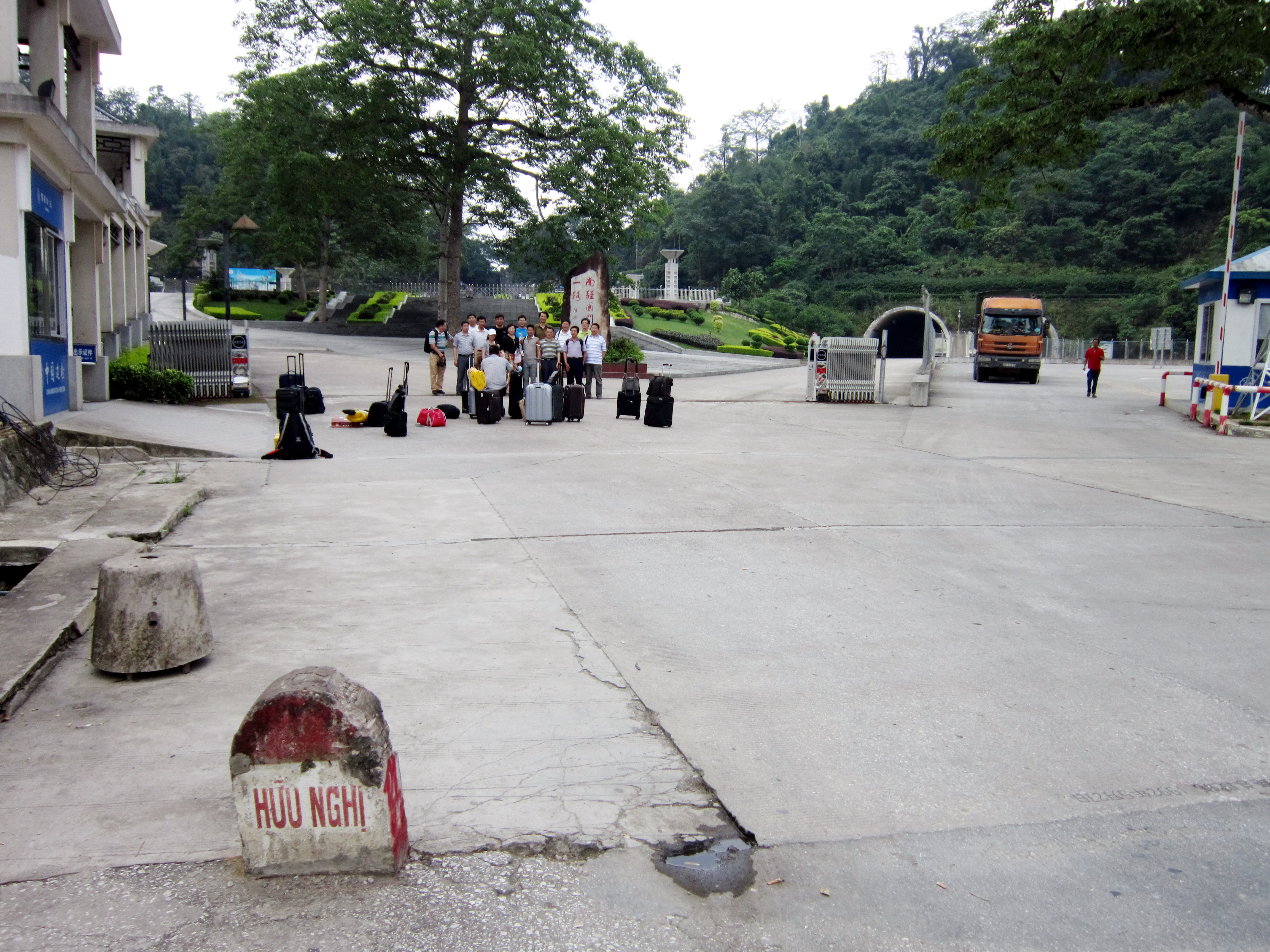 Cây số 0 được đặt tại ranh giới Việt Nam và Trung Quốc. Phía sau cột cây số là phần đất của Trung Quốc.